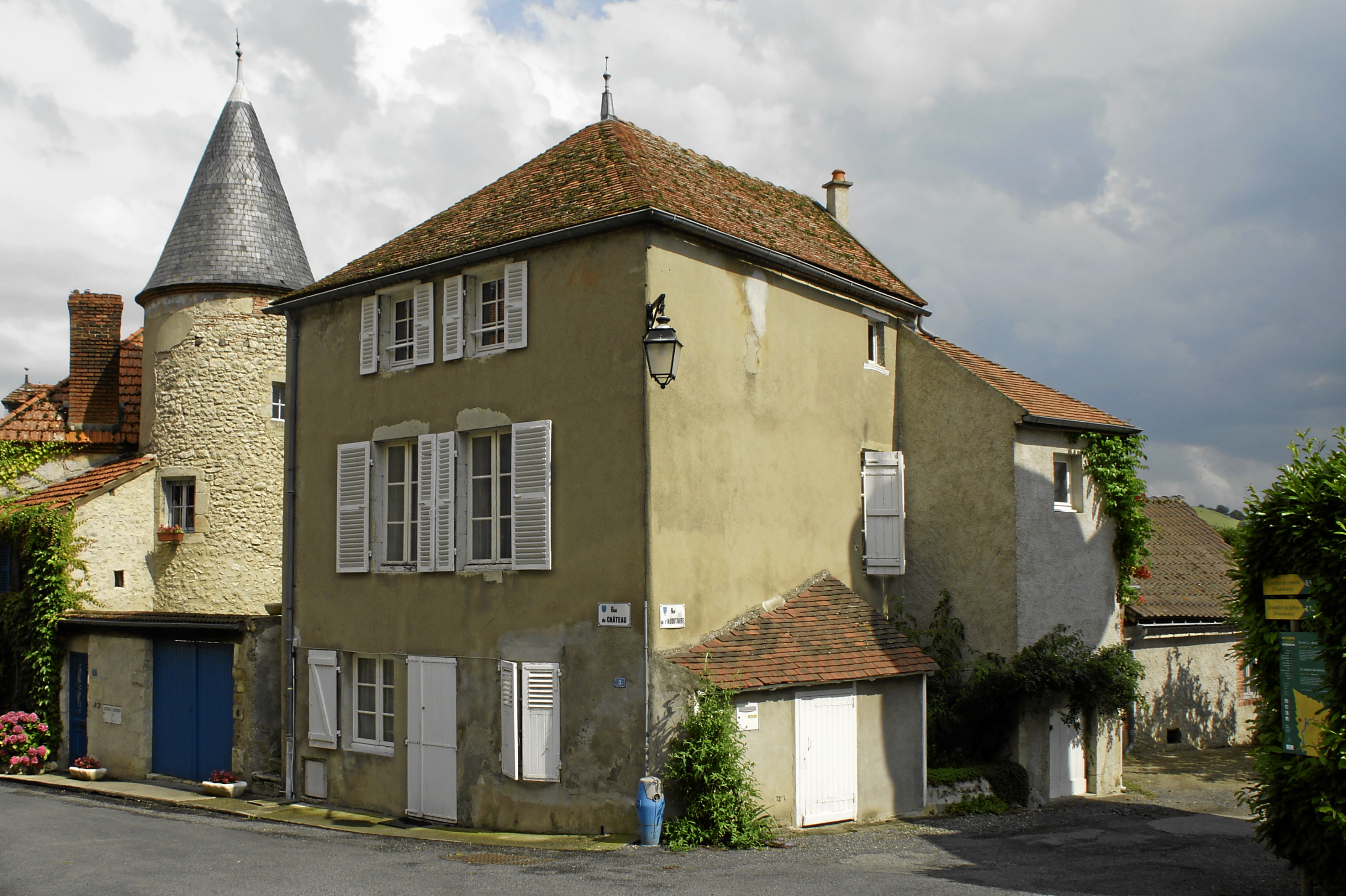 Billy (Allier)